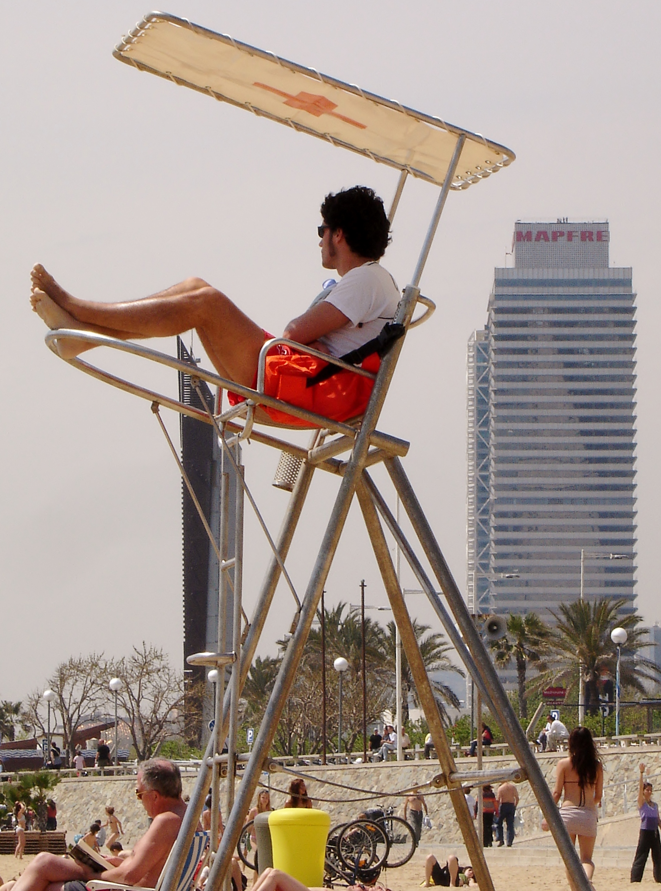 Barcelona's bodyguard